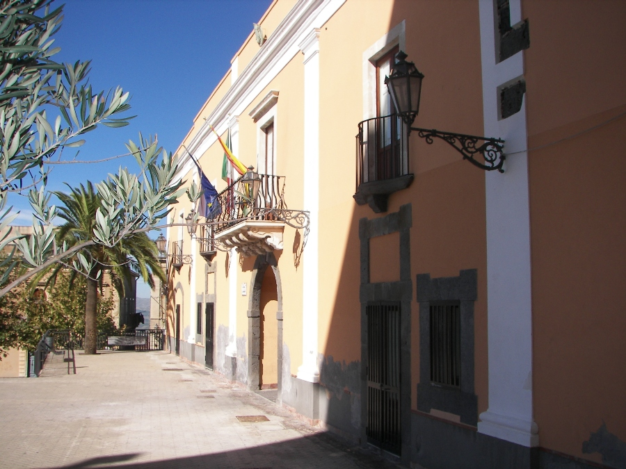 La facciata del Palazzo Comunale, ex sede abbaziale. edificato su preesistenti struttue medioevali nel 1662, deve il suo prospetto odoerno ai restauri del secolo XIX.